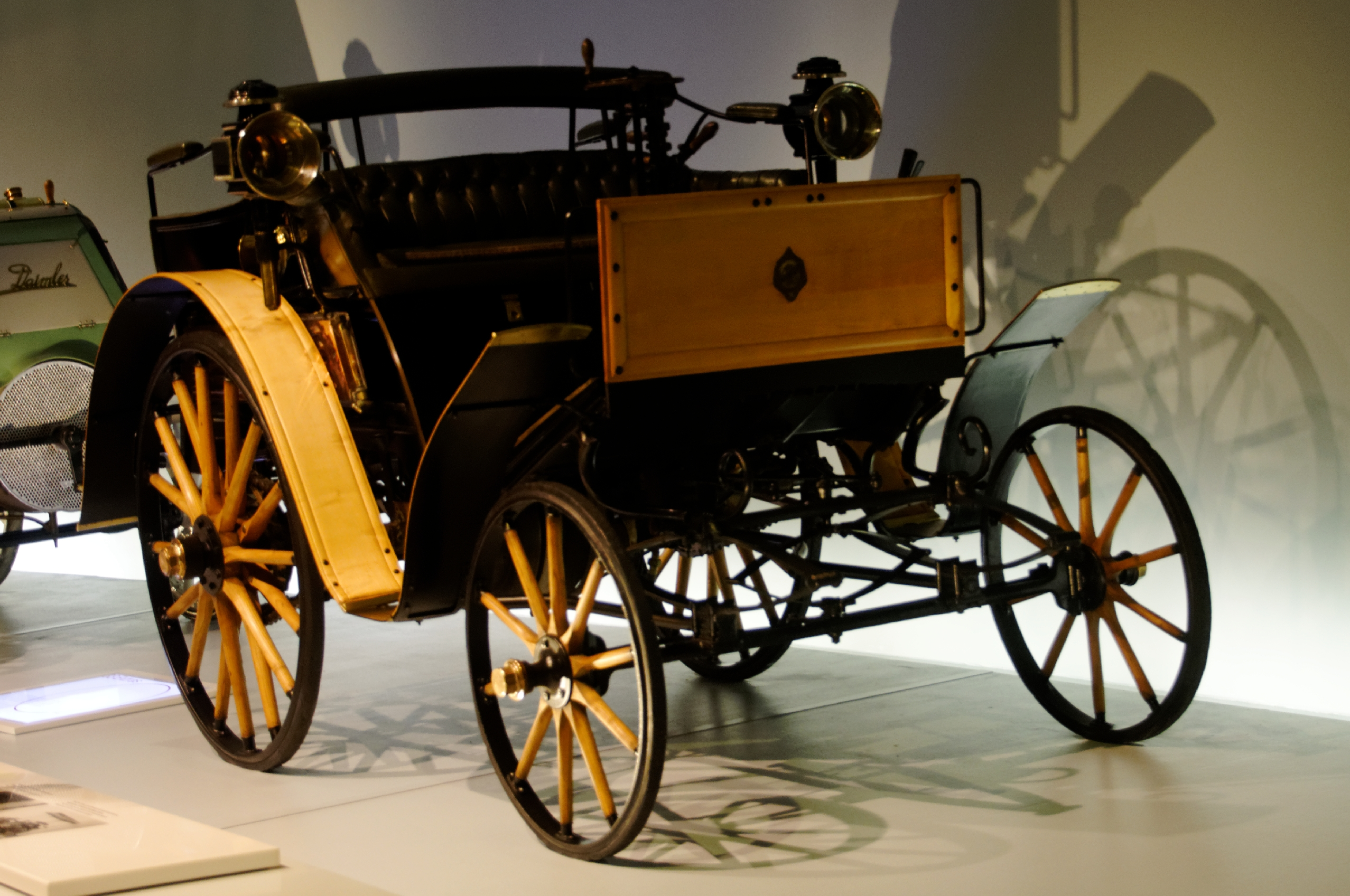 Bilder aus dem Mercedes-Benz-Museum 2015